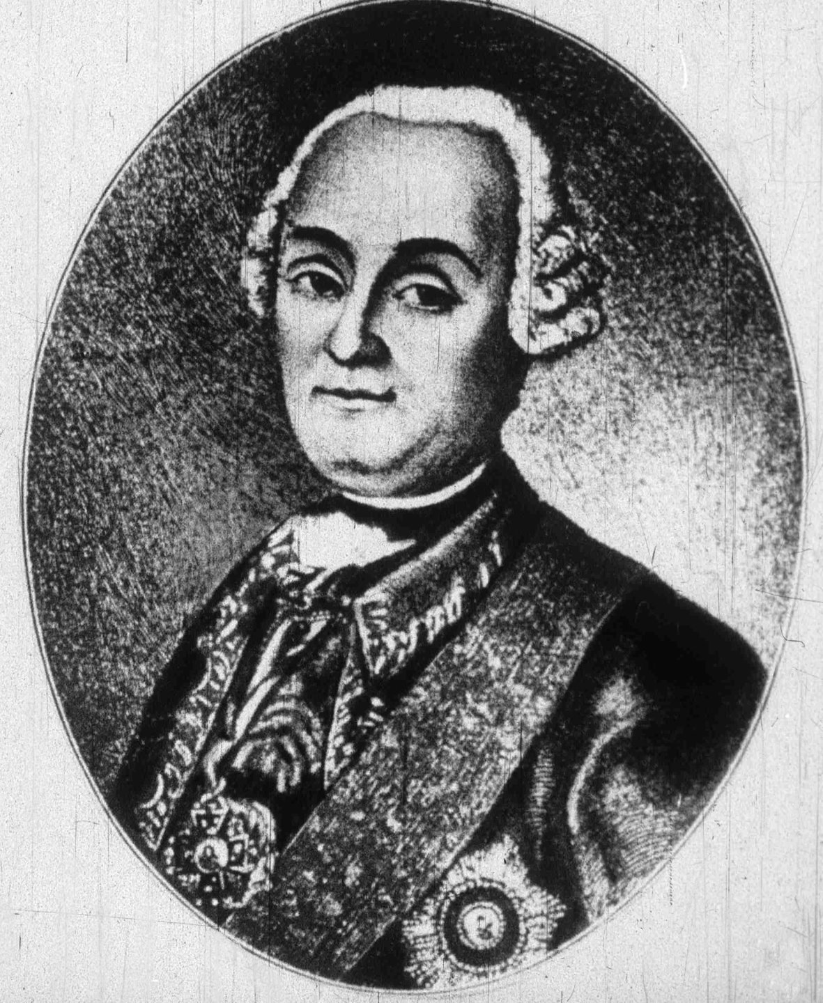 Суворов Василий Иванович, отец А. В. Суворова